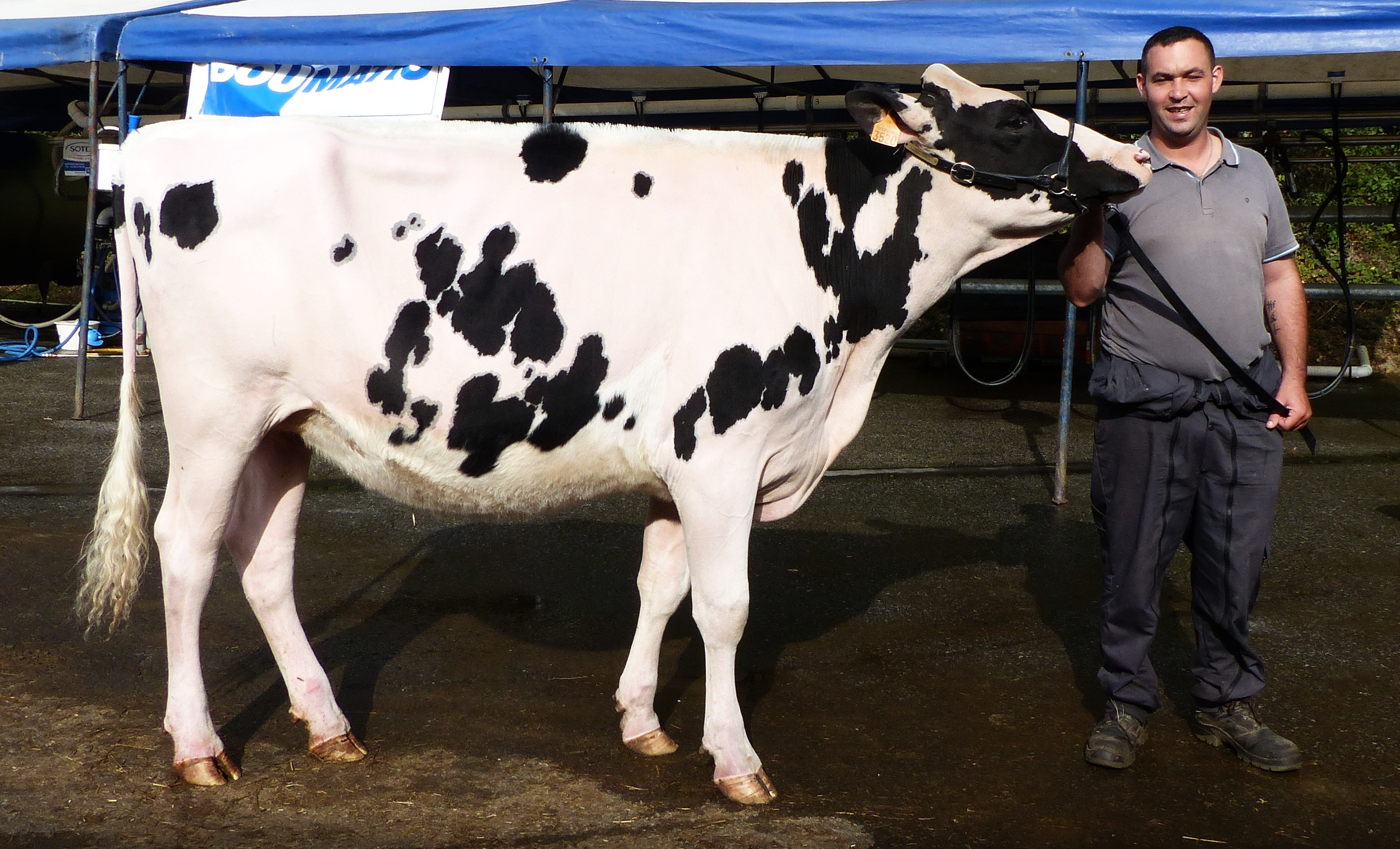 Vache de race Prim'Holstein au concours bovin régional de Pontivy, avec son éleveur.